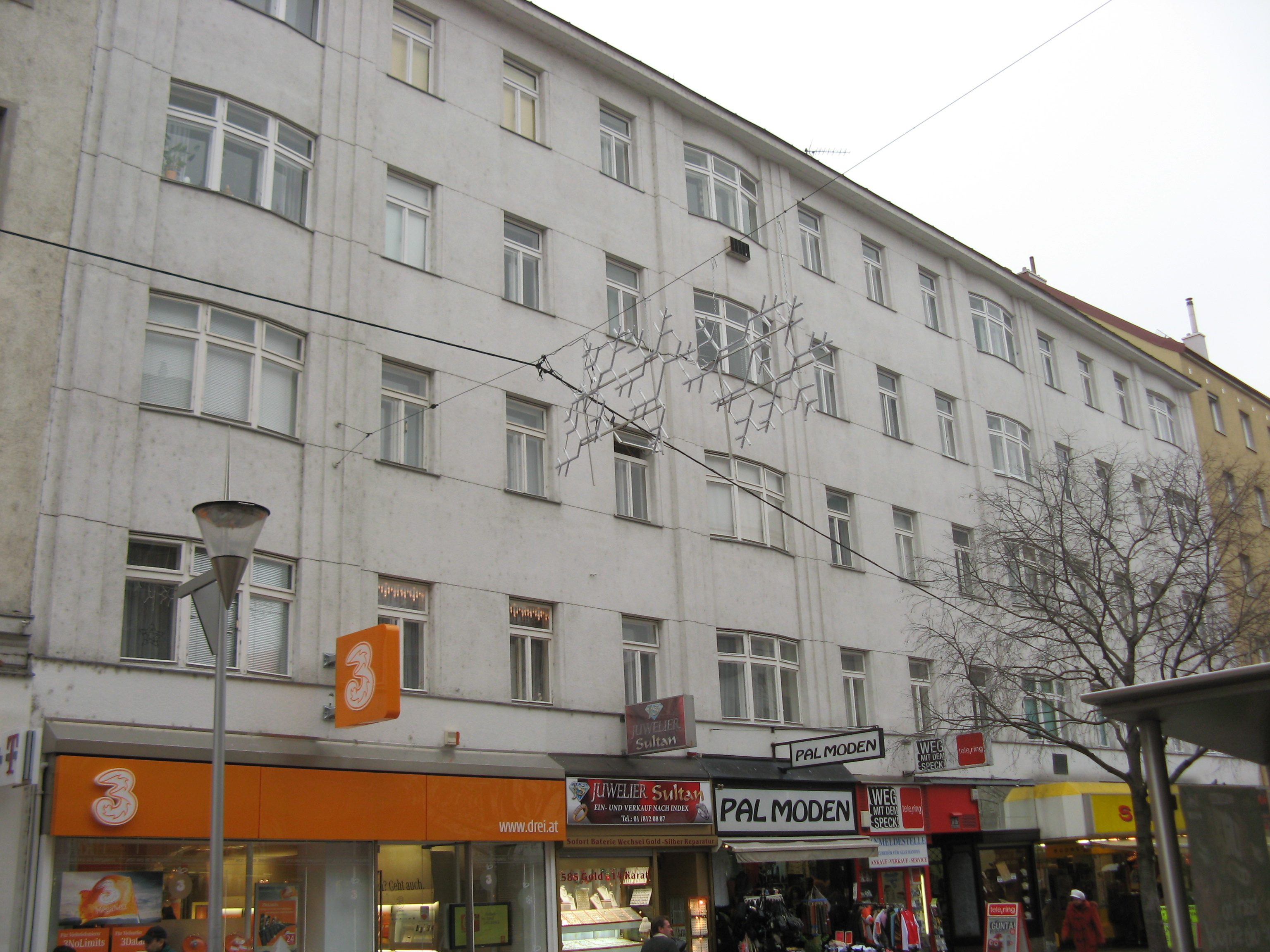 Miethaus in der Meidlinger Hauptstraße 16-18 in Wien-Meidling von Ernst Epstein (1935)